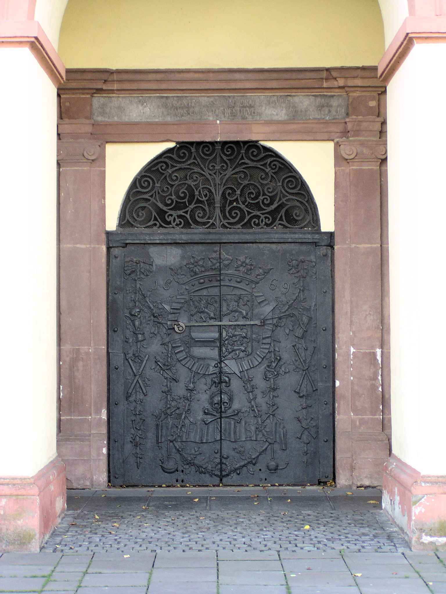 Schmiedeeisernes Portal der Fürstengruft aus dem 18. Jahrhundert am Unteren Schloss in Siegen/Westfalen.